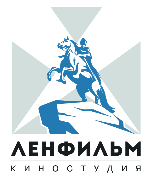 Стилизованный логотип киностудии Ленфильм